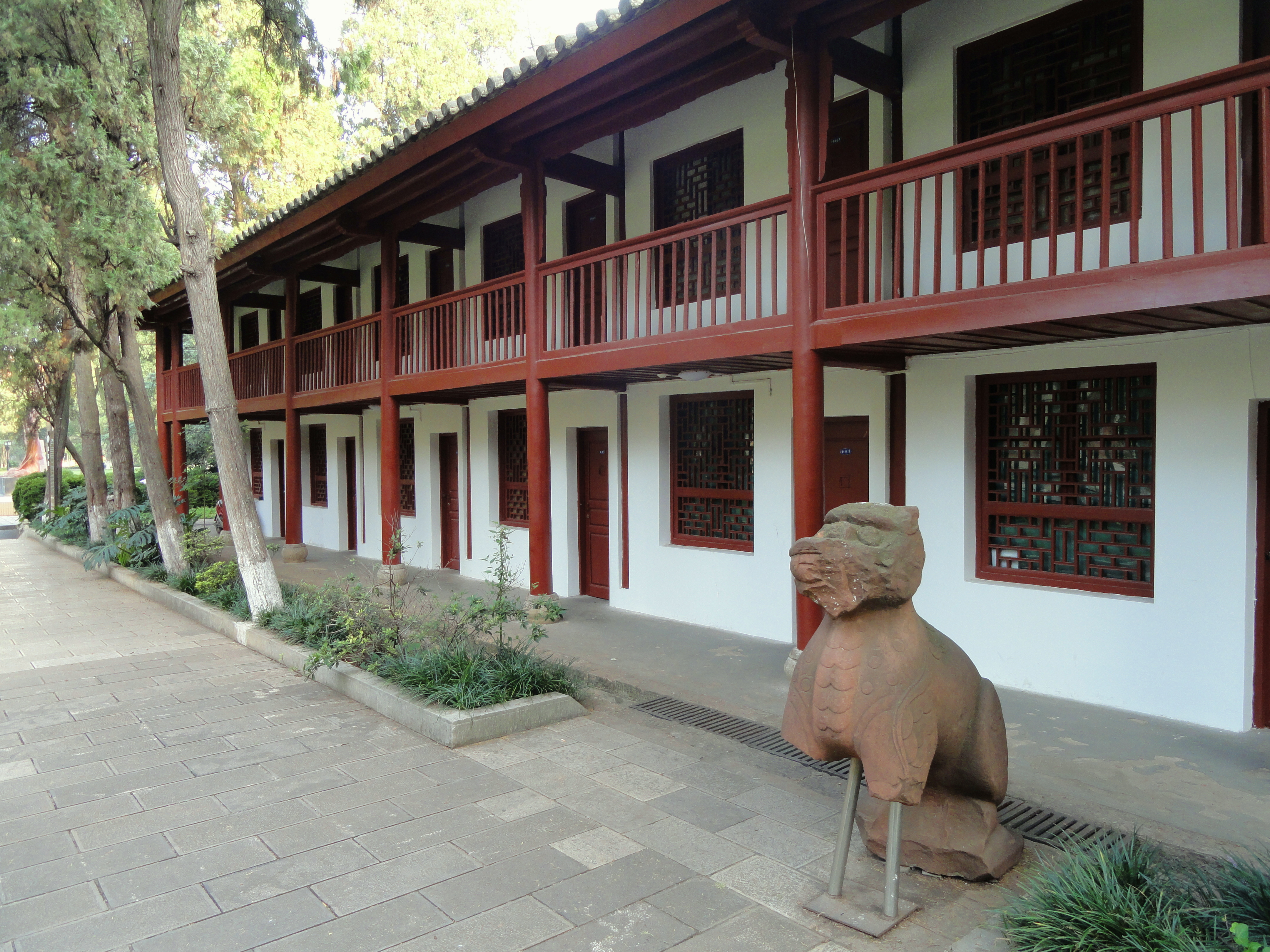 Yunnan University, Kunming, Yunnan, China.